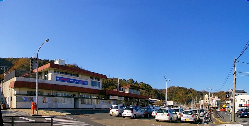 撮影：takasunrise0921